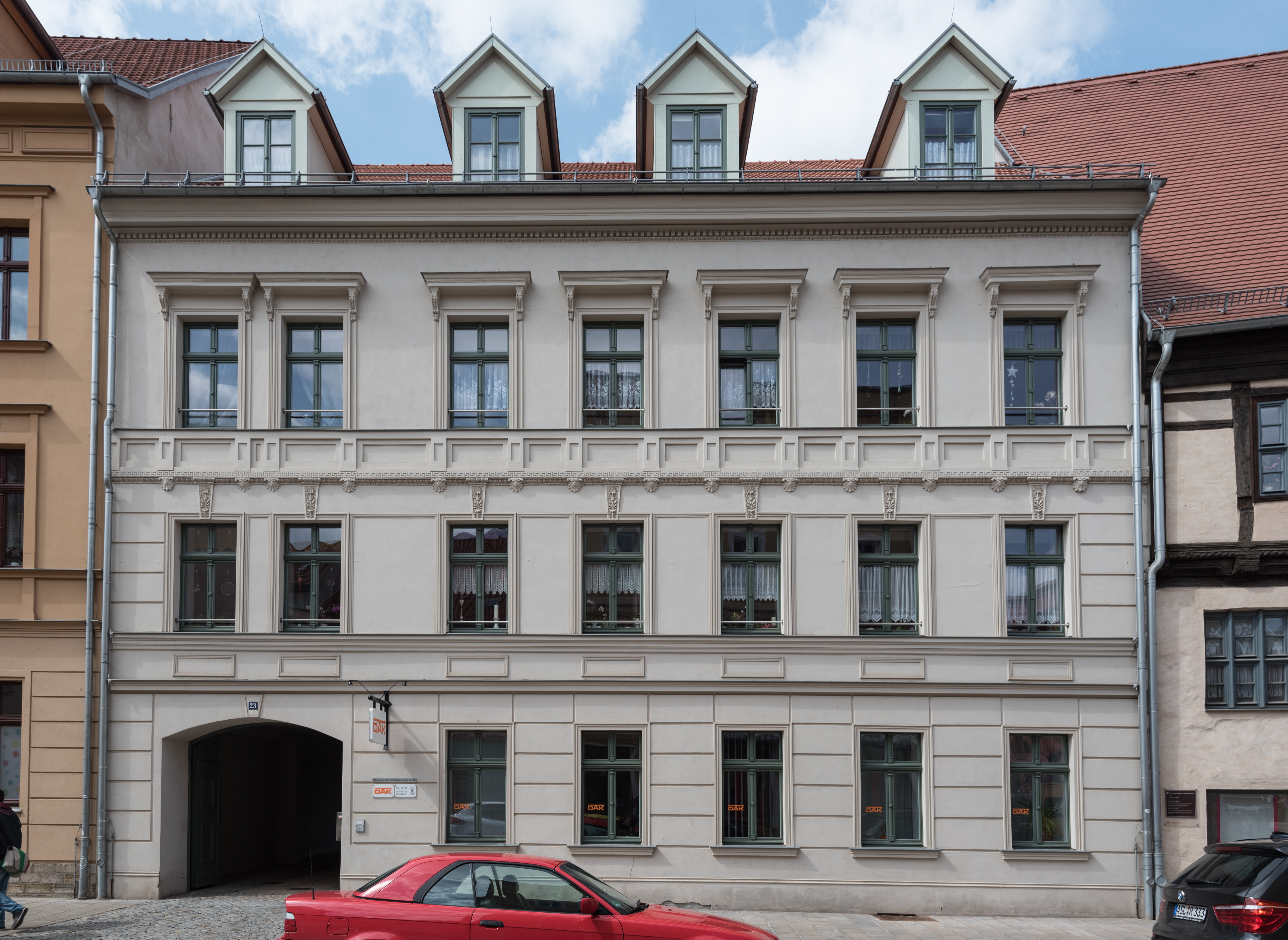 Aschersleben, Tie 23